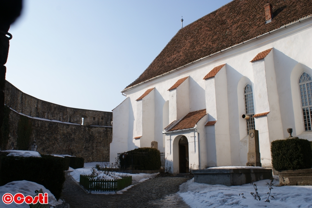 Biserica reformată 01